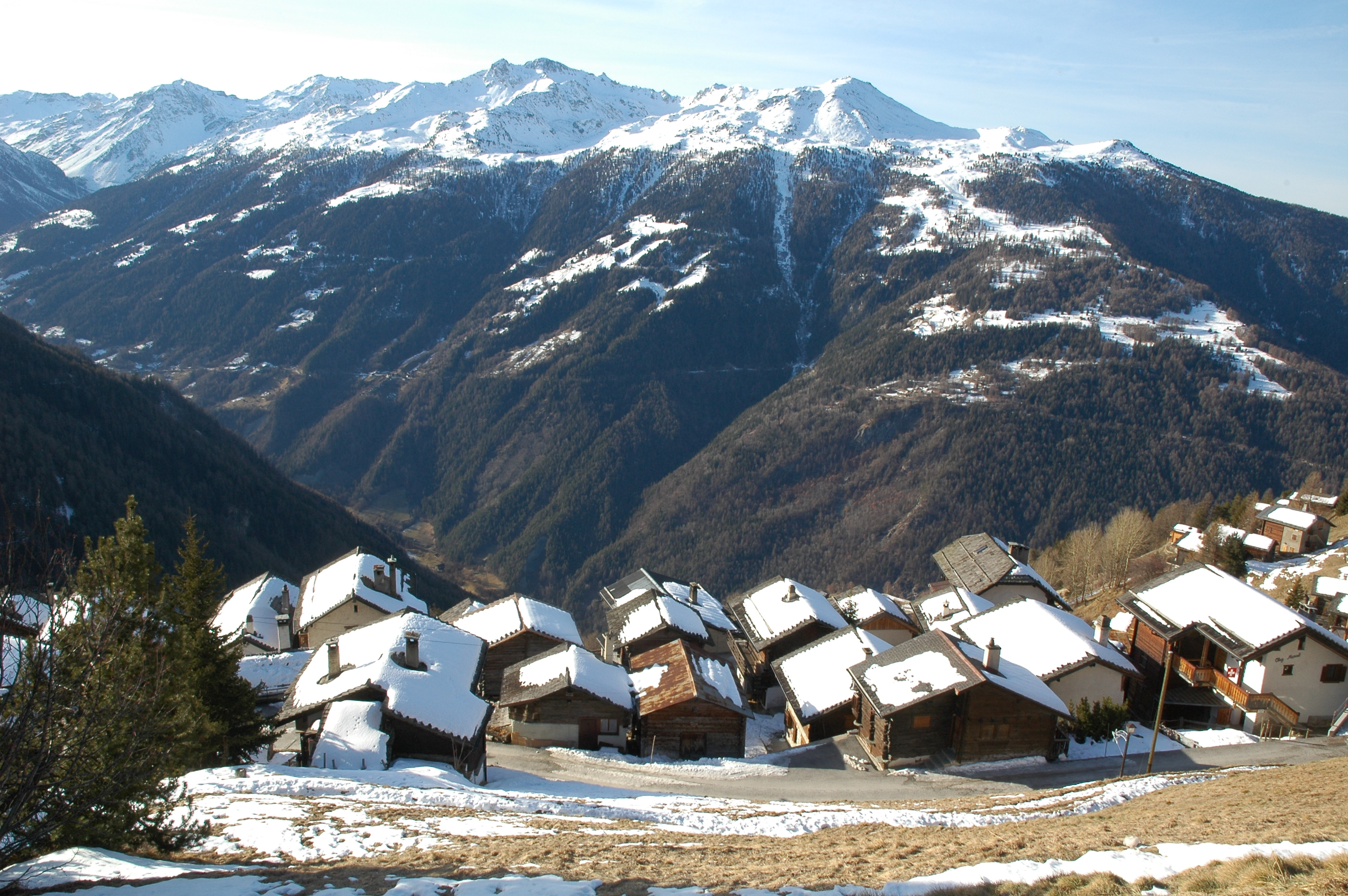 Vue du Val d'Anniviers depuis Chandolin.